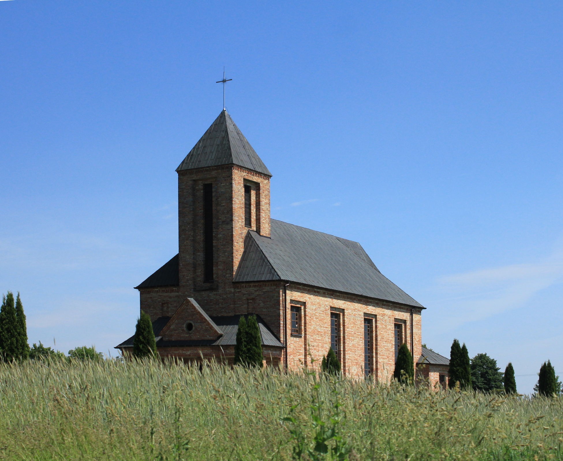 Kaplica dojazdowa w Żeliznej przynależna do Parafii Nawiedzenia NMP w Kolembrodach